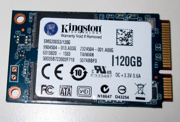 Kingston mSATA-SSD SMS200S3/120G mit 2 Euro Münze für Größenvergleich.